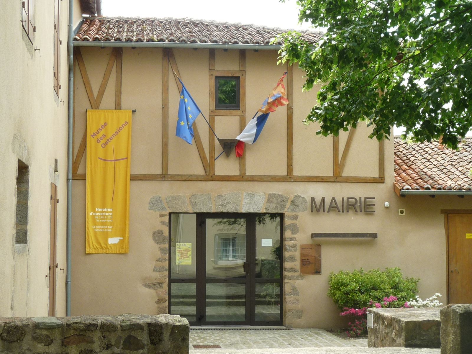 mairie d'Esse, Charente, France